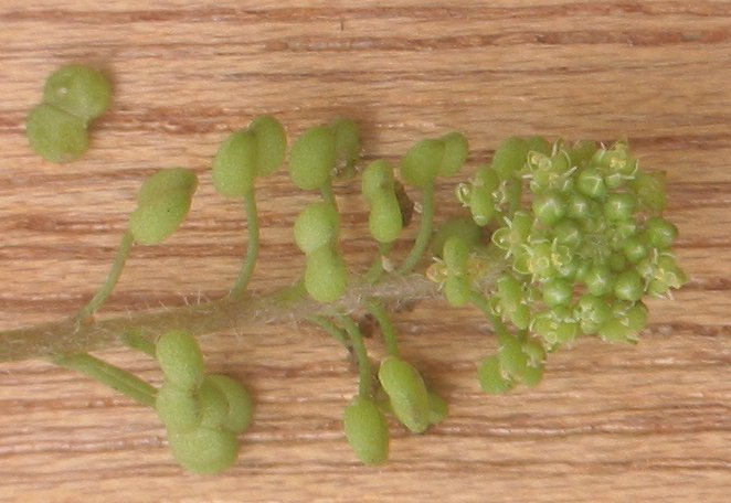 (nl: Kleine varkenskers) Coronopus didymus